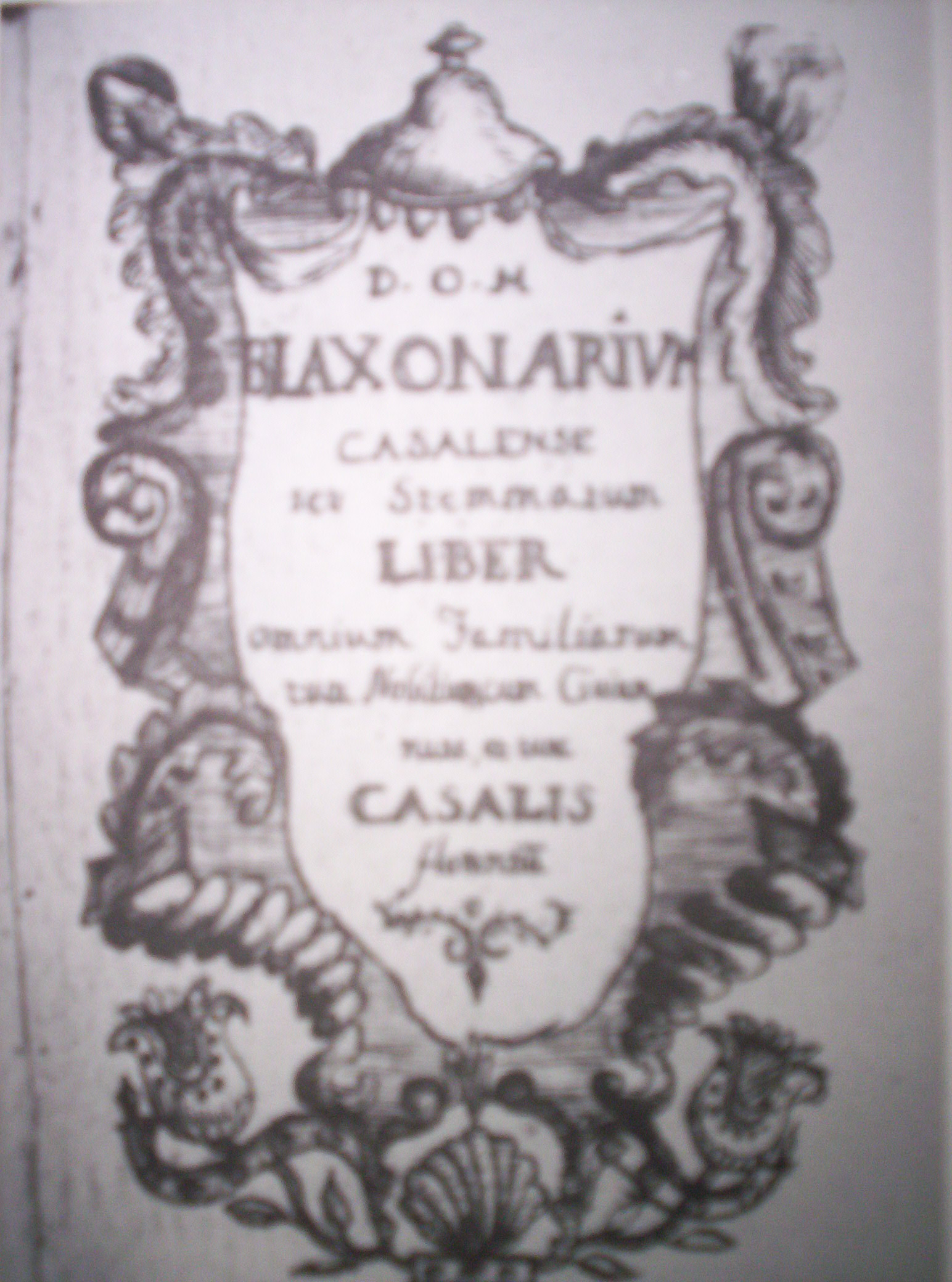 Blaxonarium casalense. Frontespizio , Immagine tratta dallo "Studium" ACCADEMIA di Casale e del Monferrato 1985.